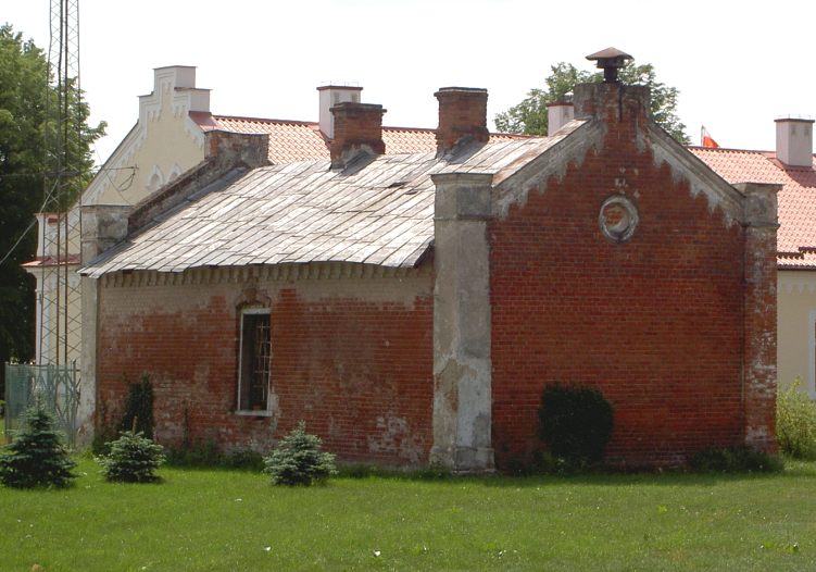 Łukowa, Poland • Centrum / Centre